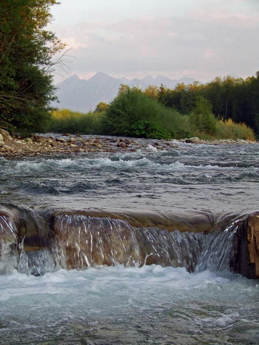 Rzeka Białka, okolice Białki Tatrzańskiej